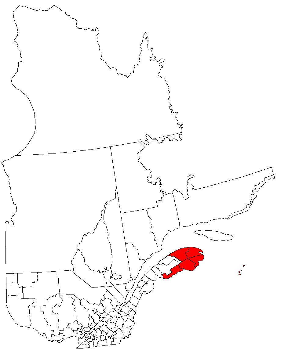 Gaspésie-Îles-de-la-Madeleine, Quebec